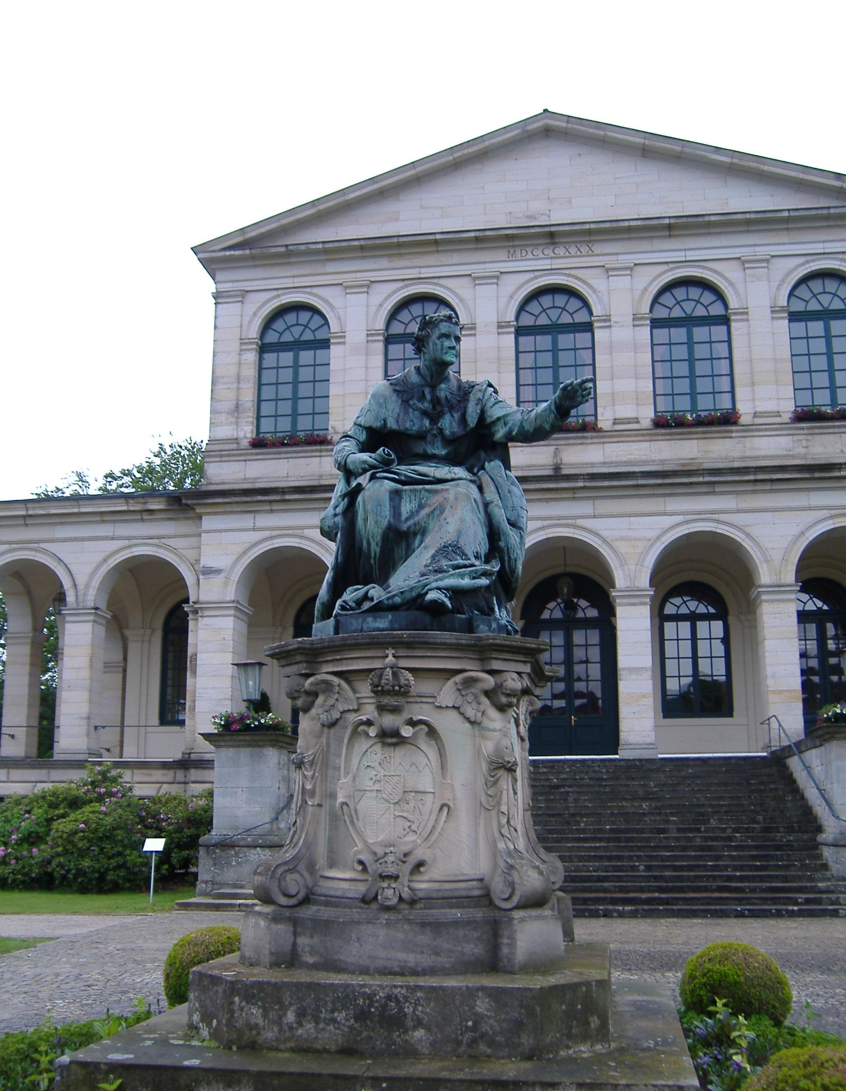 Denkmal König Ludwig I. im Staatsbad Bad Brückenau